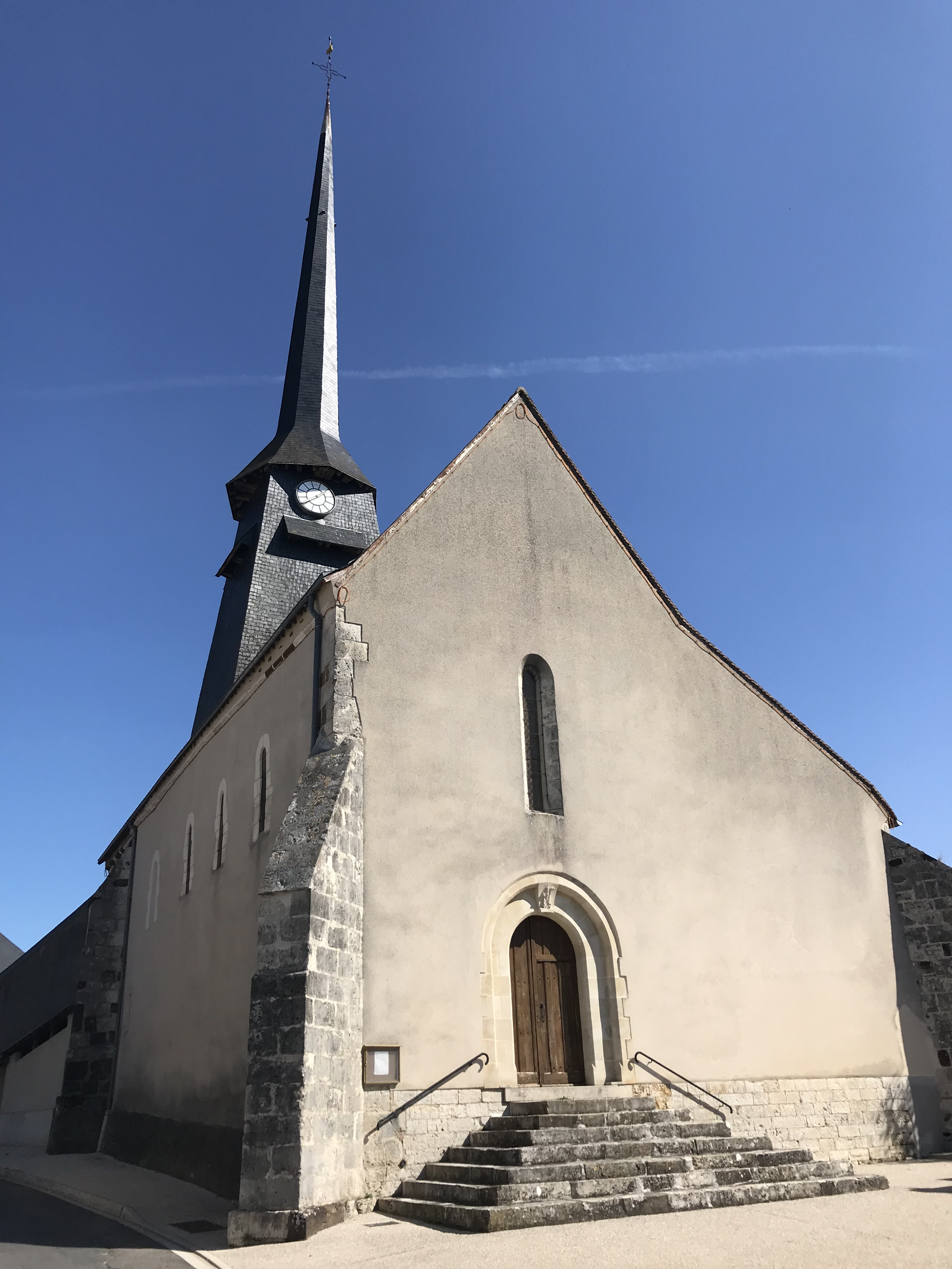 Église Saint-Amateur de Pierrefitte-ès-Bois.